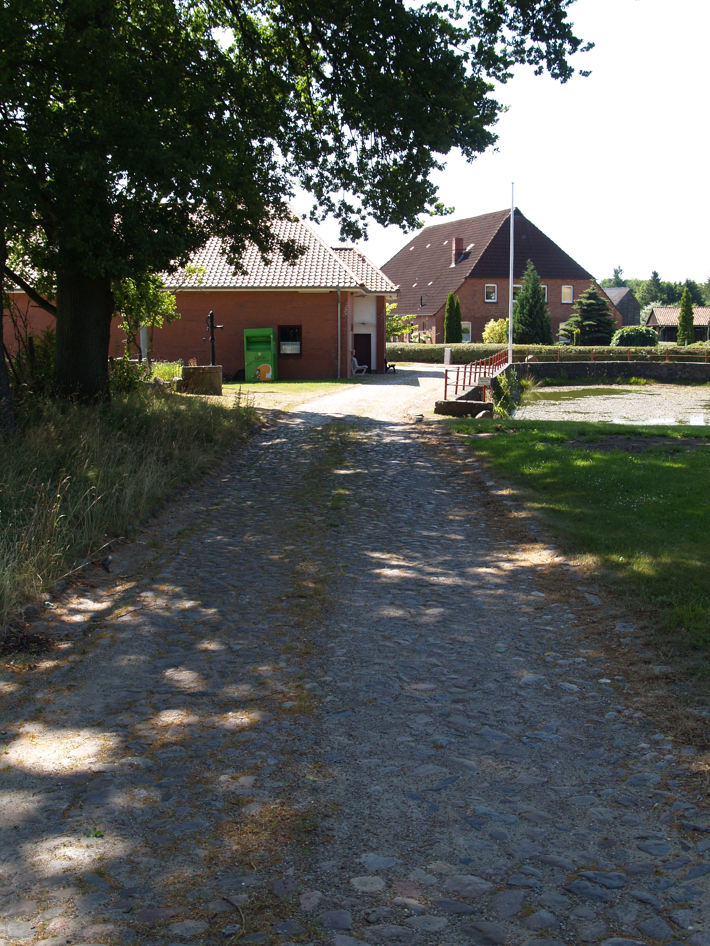 Pflasterstraße in Juliusburg, Herzogtum Lauenburg, Deutschland